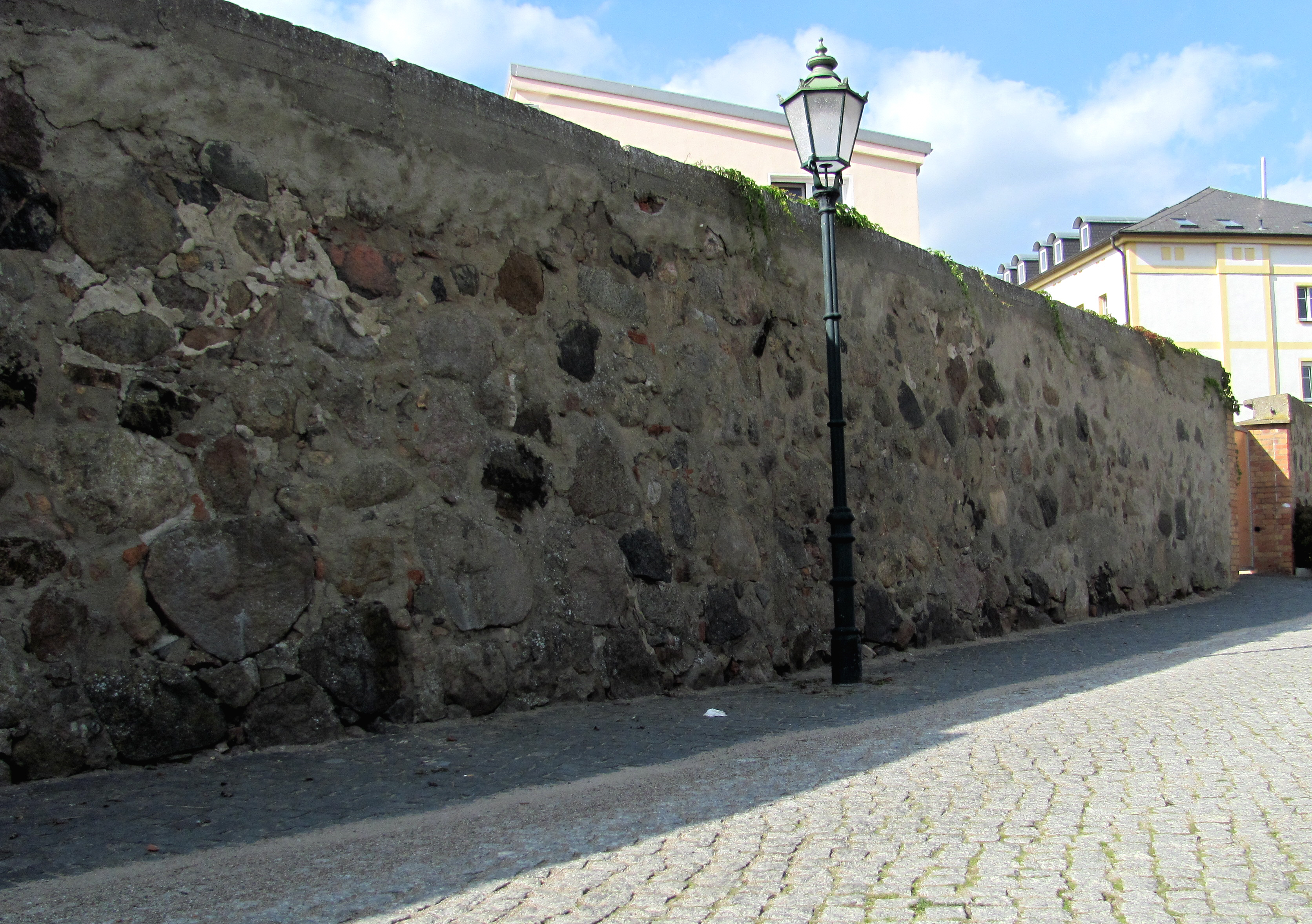 Schwedt, Teile der Stadtmauer, rekonstruiert